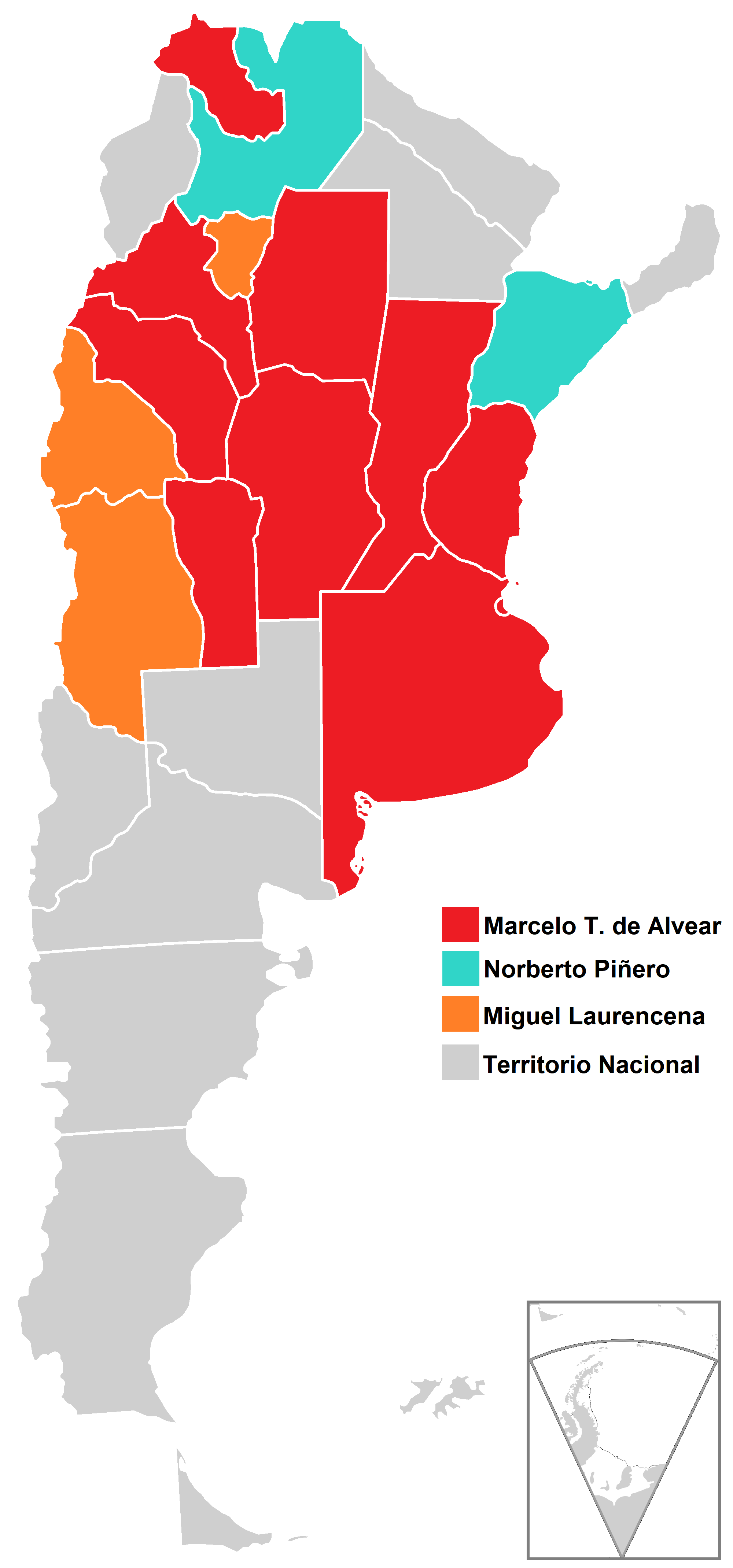 Mapa de las elecciones presidenciales de Argentina de 1922.